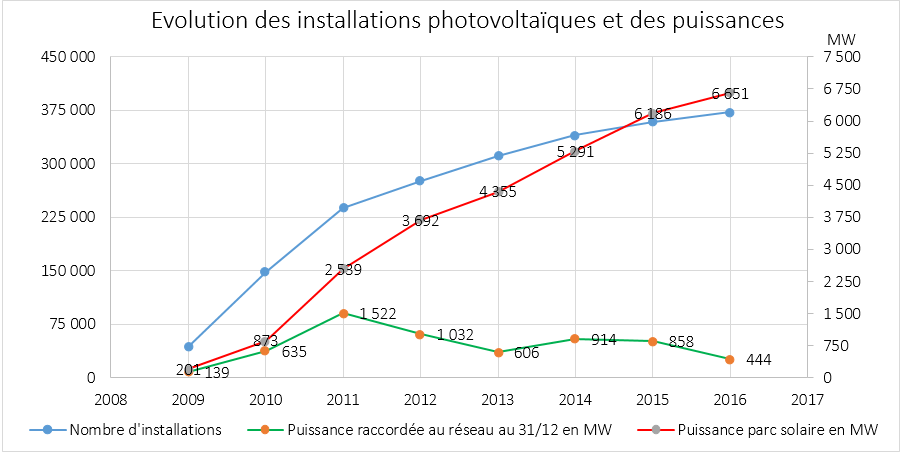 Evolution des installations photovoltaïques et de la puissance du parc photovoltaïque